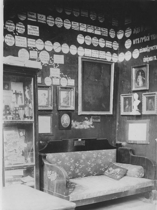 Родословная зала в доме Колычевых-Боде (Соллогубов) на Поварской